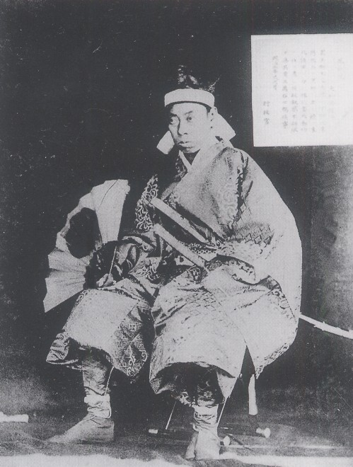 大村純熈 Oomura Sumihiro.